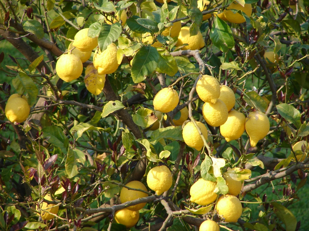 Zitronenbaum (Citrus x limon) auf Korfu